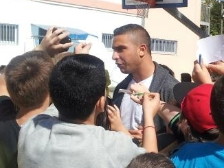 שמעון אבו חצירא